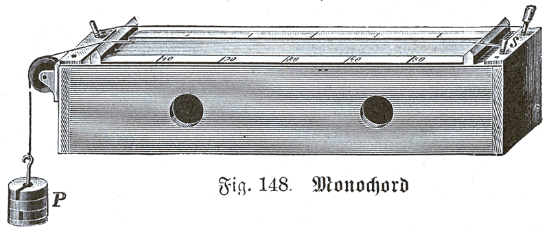 Monochord